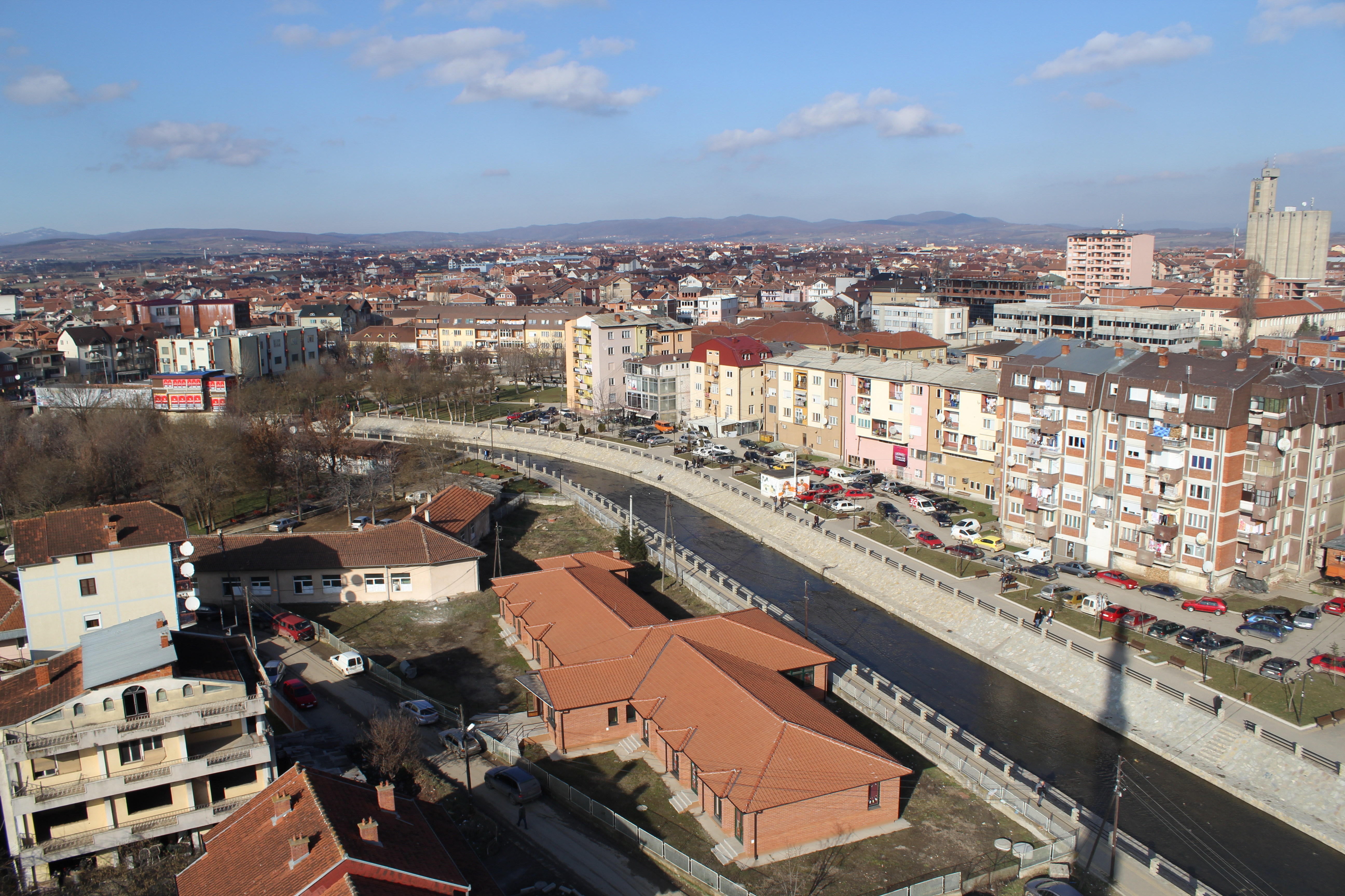 Pamje nga Xhamia 6